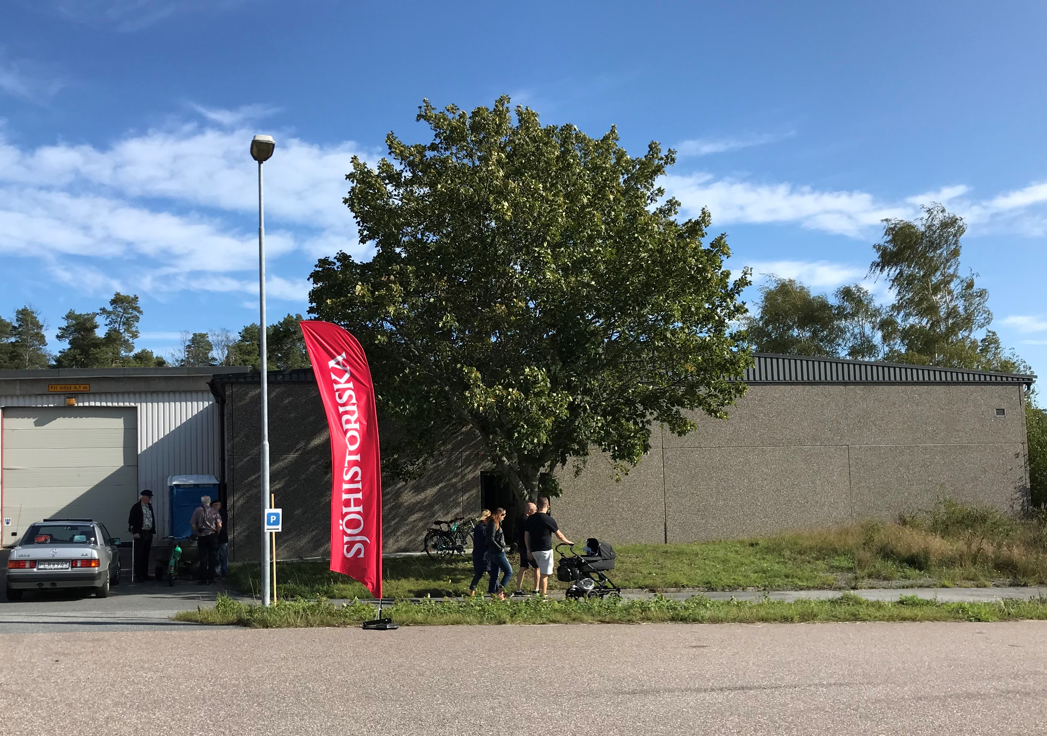 Sjöhistoriska museets båtmagasin på Rindö, 14 september 2019